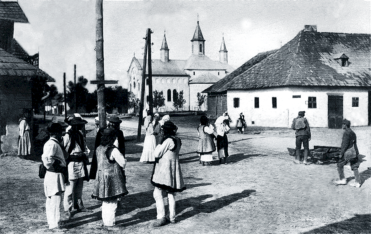 Berhometh z. Zt. der Eliktrifizierung um 1890